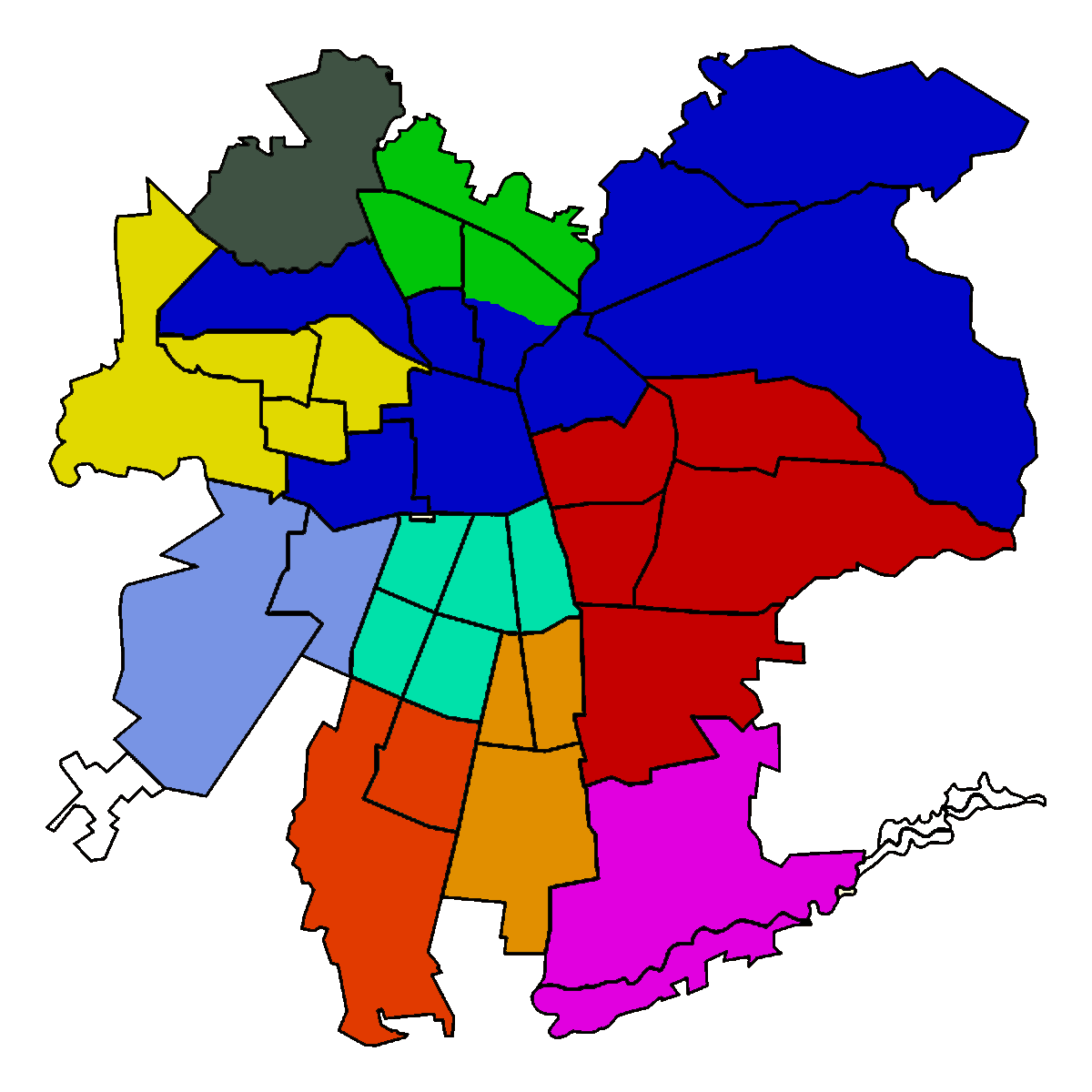 Mapa político de los Cuerpos de Bomberos de la ciudad de Santiago de Chile